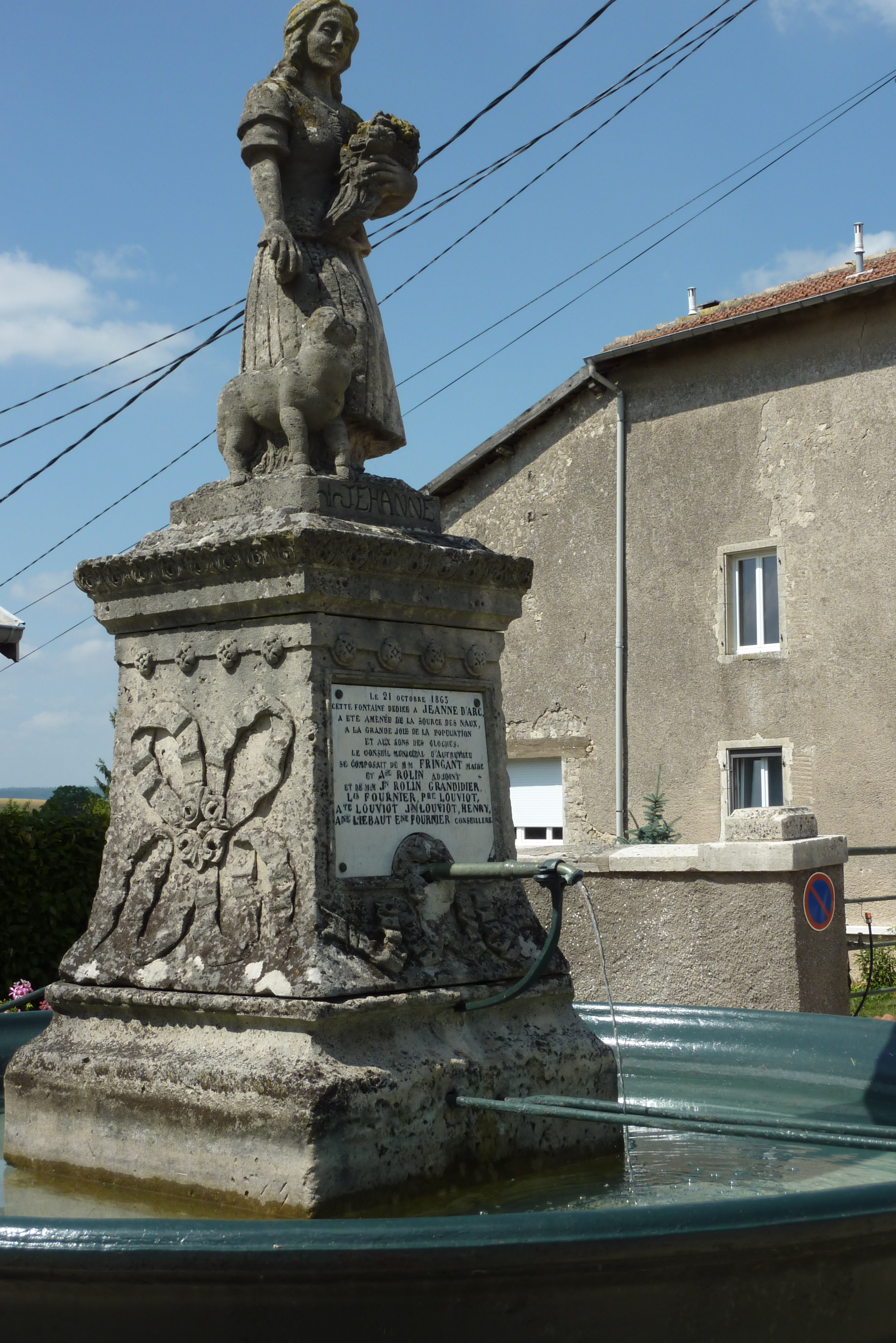 Fontaine mit Denkmal für Jeanne d'Arc bei der Kirche St. Brice in Autreville